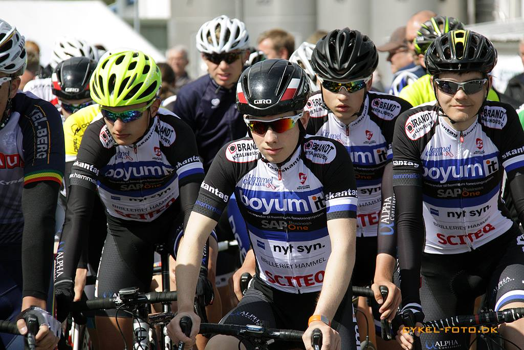 Pinseløb